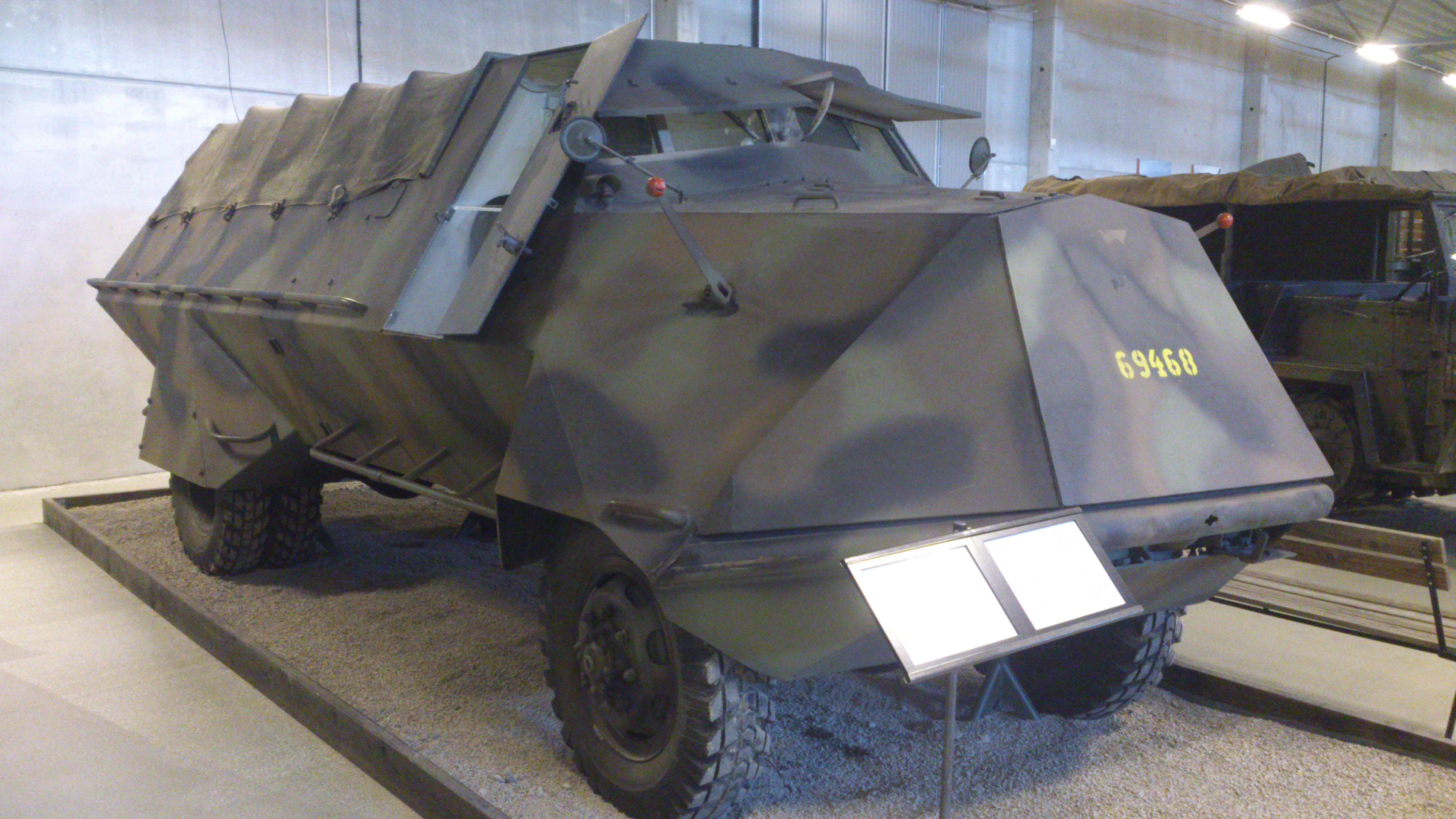 Terrängbil M 42 SKP på Försvarsfordonsmuseet Arsenalen i Strängnäs